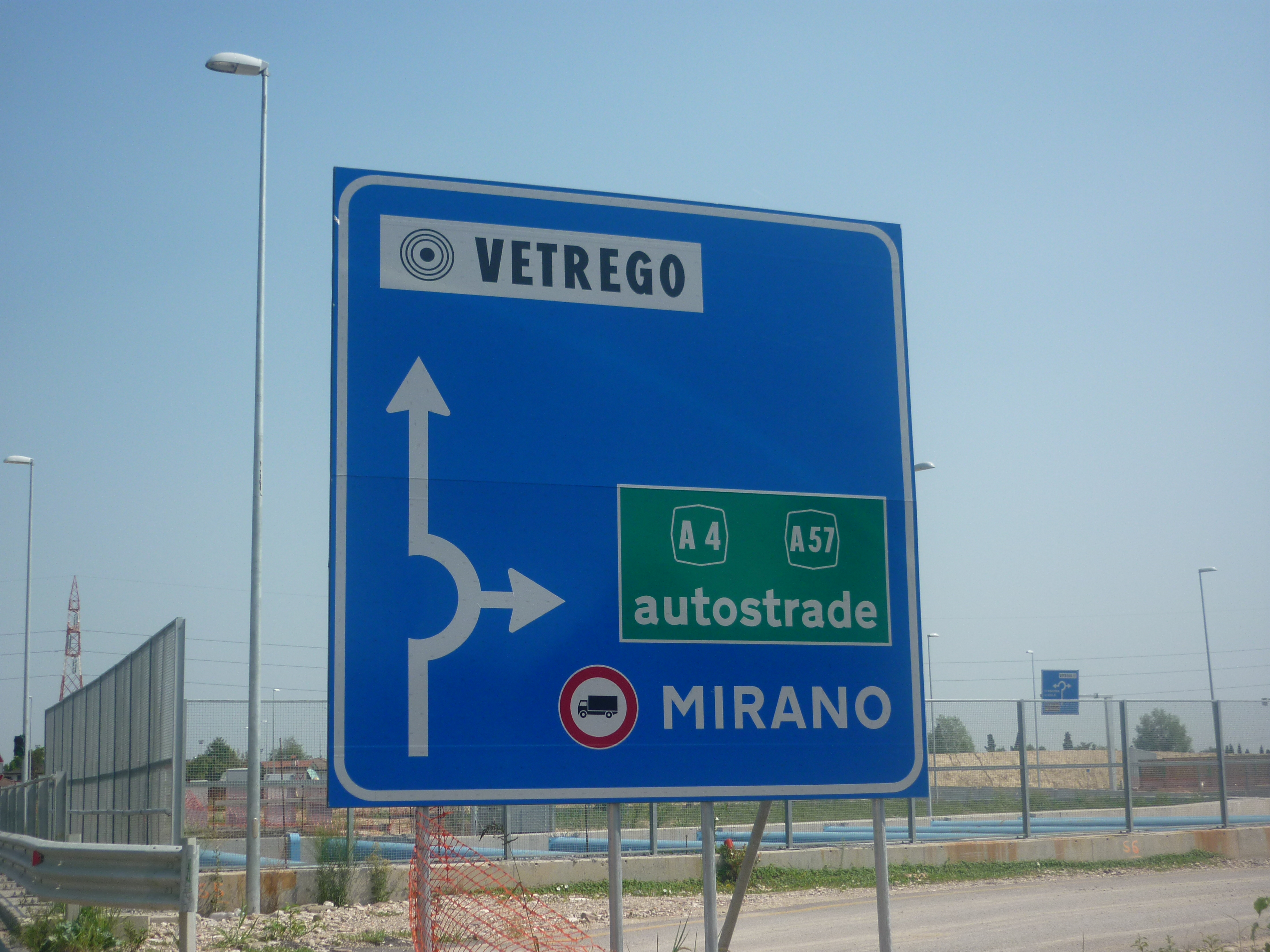 A57